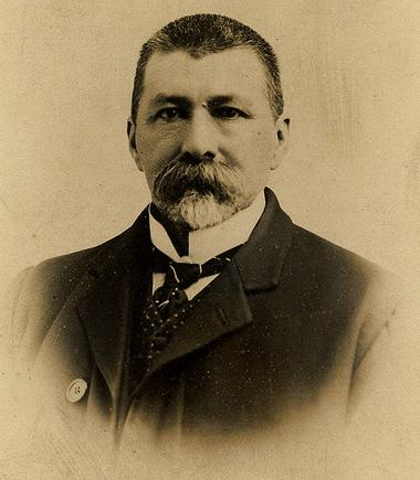 Político colombiano, Francisco Montaña, fallecido en 1925.